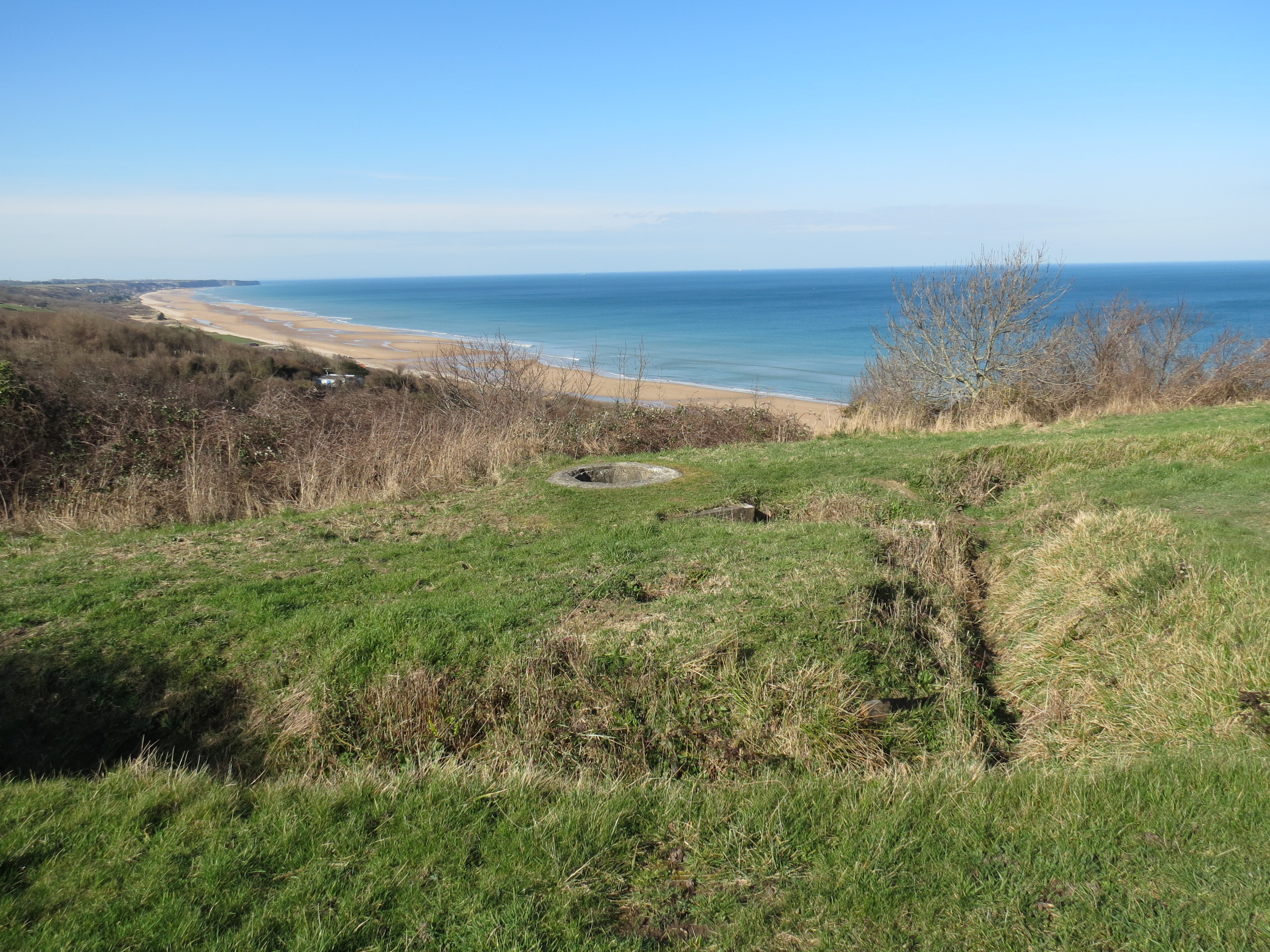 Omaha Beach - WN 60